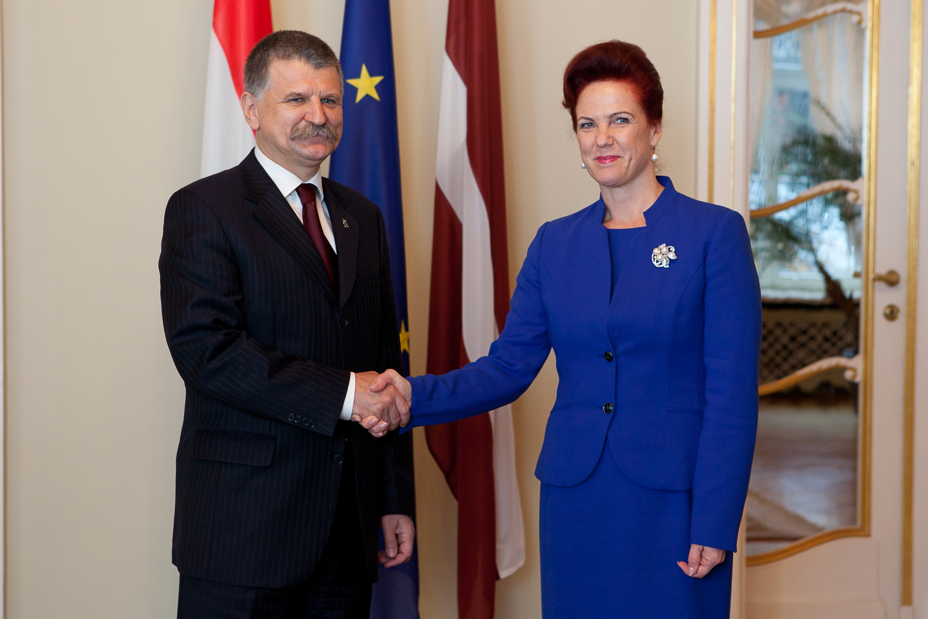 2012.gada 25.oktobris. Saeimas priekšsēdētāja Solvita Āboltiņa tiekas ar Ungārijas parlamenta priekšsēdētāju Lāslo Kevēru (László Kövér). Foto: Ernests Dinka, Saeimas Kanceleja